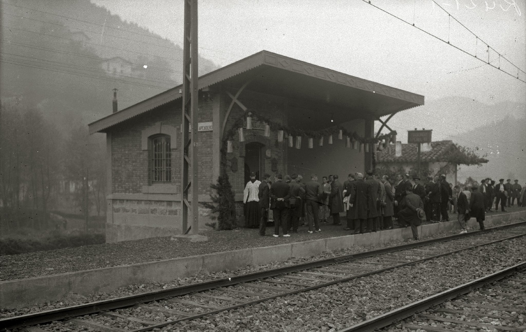 Fiesta de inauguración de la estación en 1930